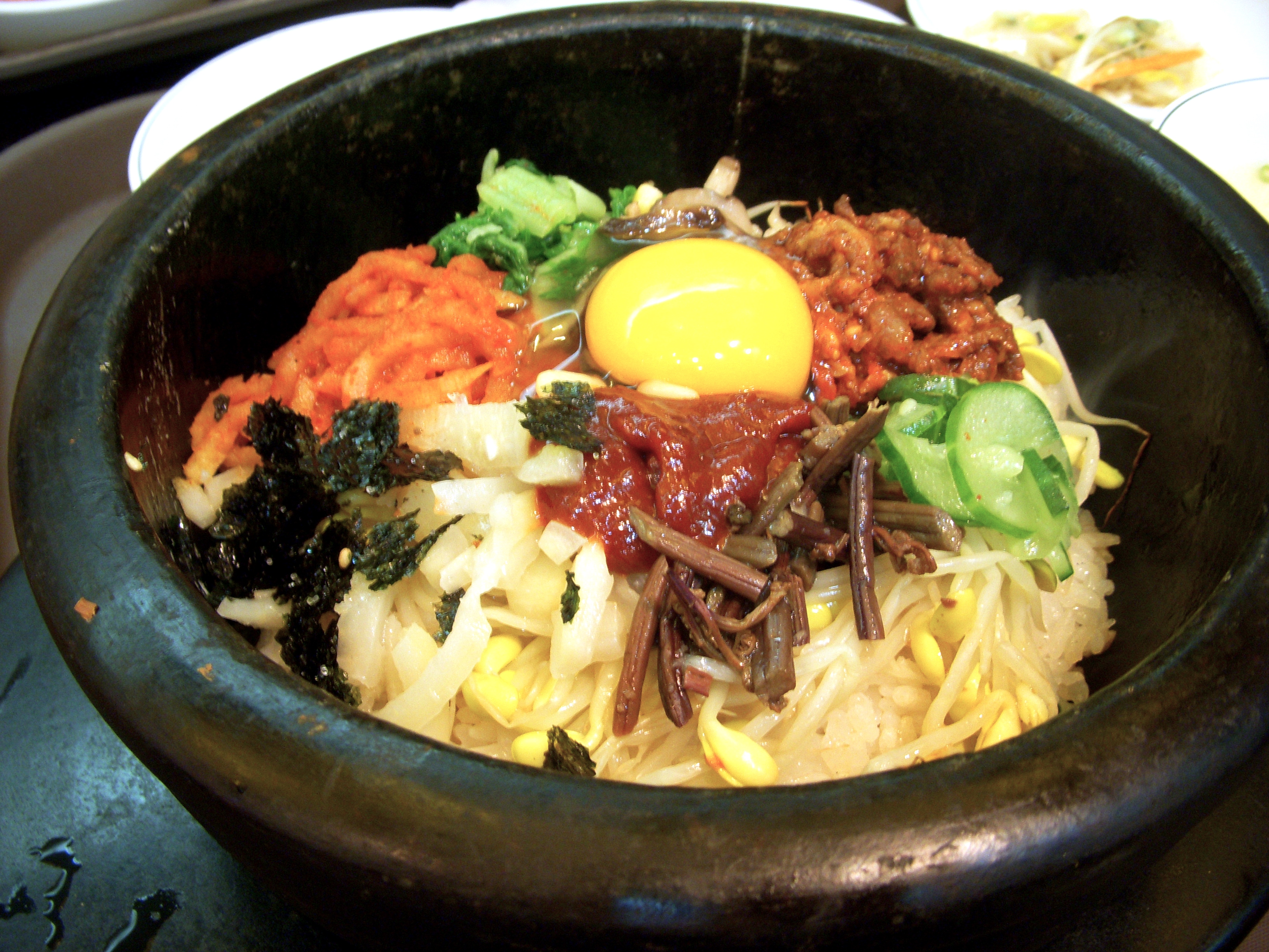 Bibimbap in Korean cuisine